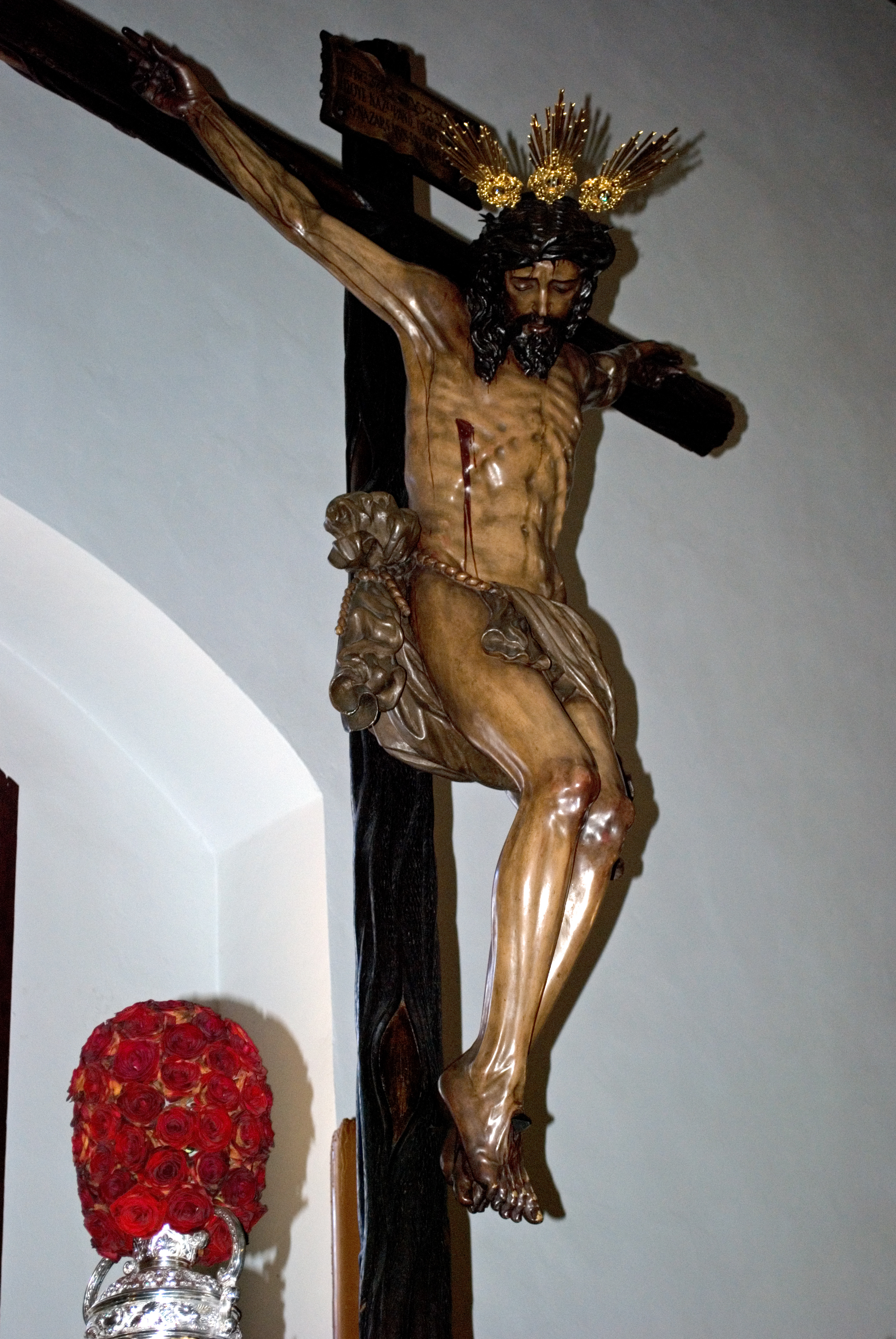 Cristo de la Buena Muerte, Hermandad de la Hiniesta, iglesia de San Julián en Sevilla